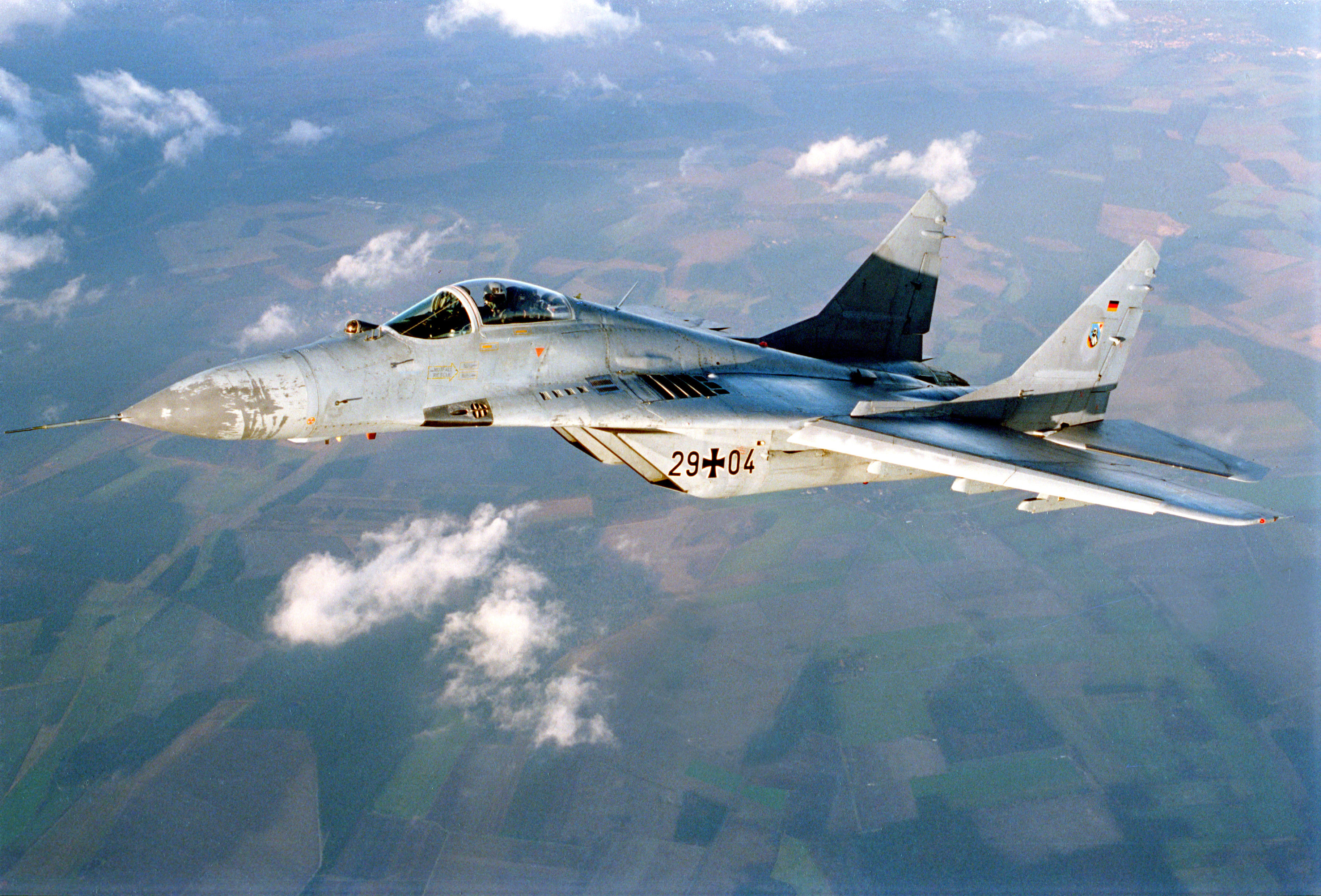 Mig-29 Fulcrum. Das in der Sowjetunion entwickelte und gefertigte Flugzeug wurde ab 1988 an die Landstreitkräfte der ehemaligen DDR geliefert. Die Luftwaffe übernahm 1990 zwanzig Einsitzer und vier Zweisitzer der ehemaligen NVA. Leicht modifiziert (Navigationsanlage, Gps.IFF-System) wurde sie auch im NATO Luftraum eingesetzt. Die Mig 29 wurde 2003 an die Polnischen Streitkräfte übergeben. ©Bundeswehr/PizLuftwaffe